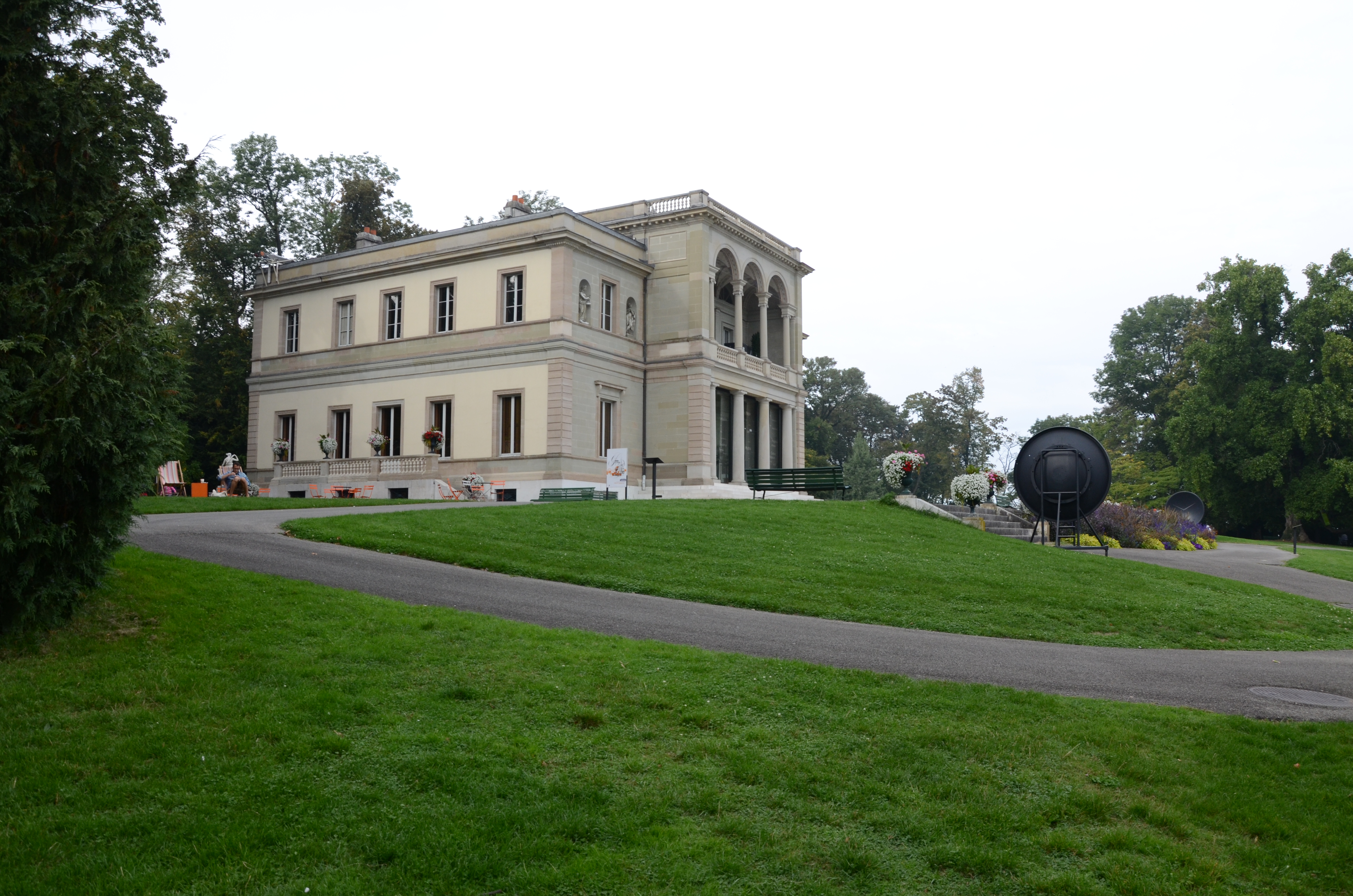 Musée d’histoire et sciences, Genève